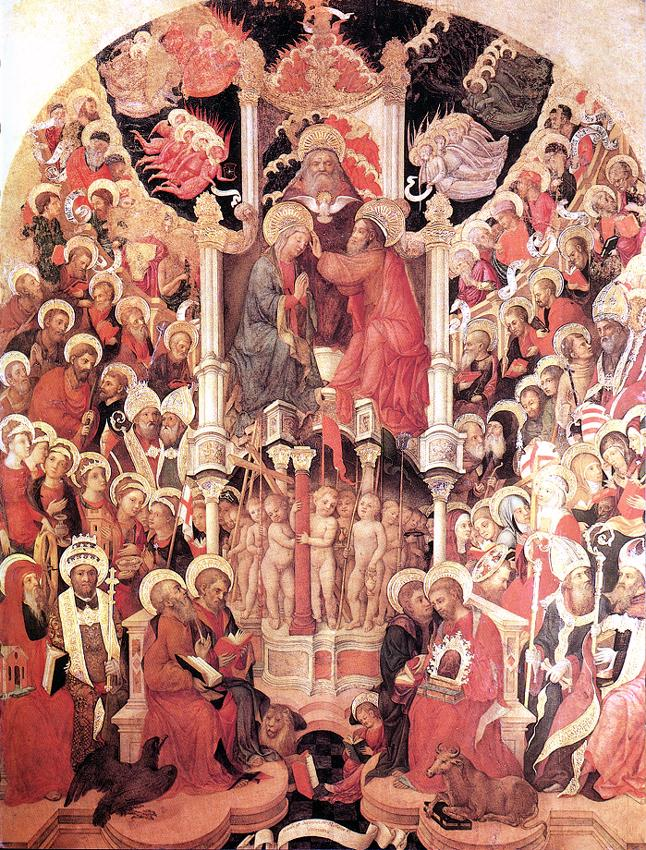 Coronación de la Virgentitle QS:P1476,es:"Coronación de la Virgen" label QS:Les,"Coronación de la Virgen"